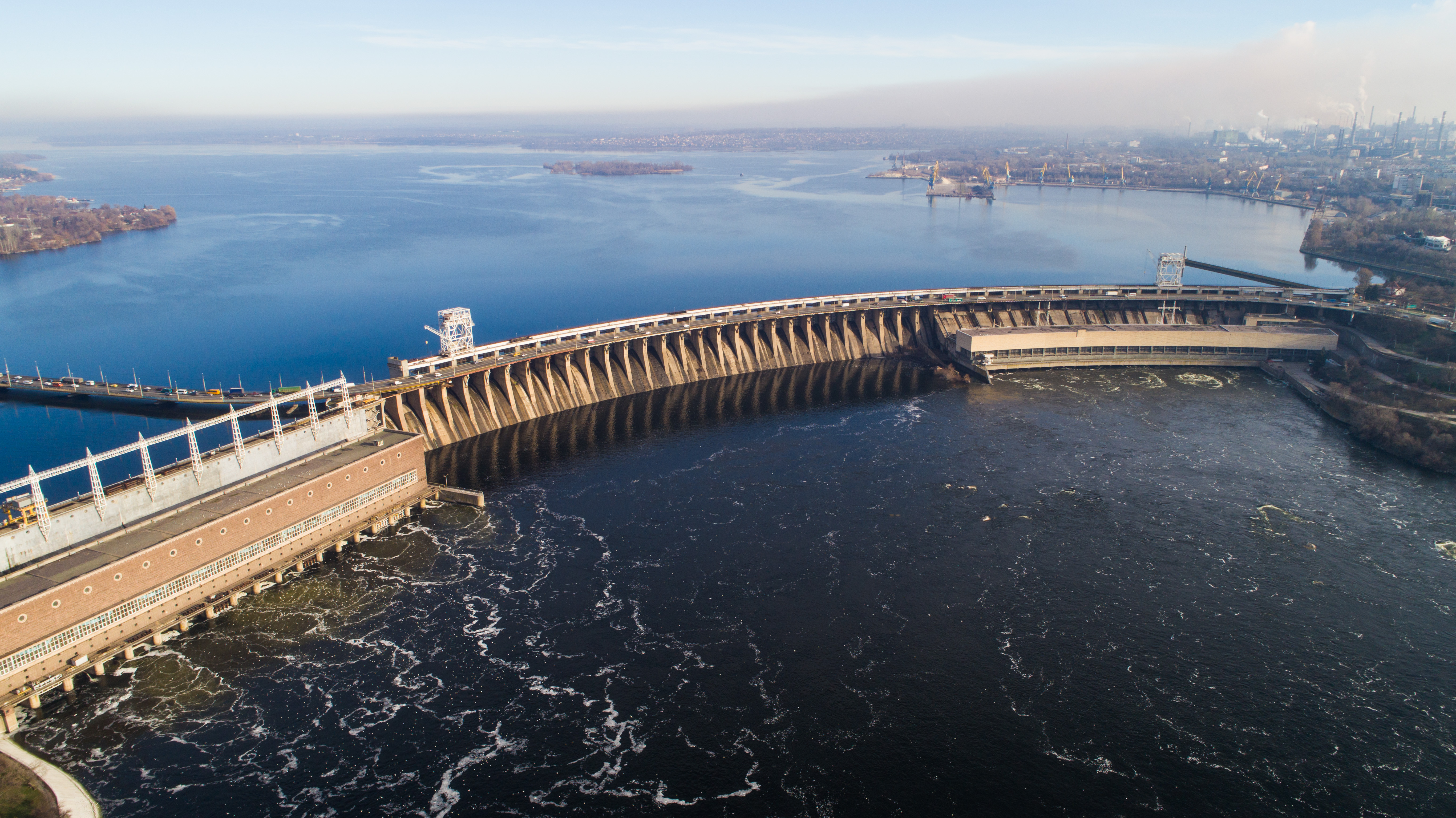 Дніпрогес (гребля і силова станція), Запоріжжя